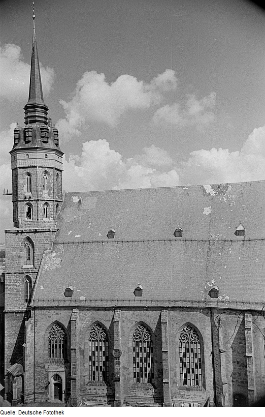 Original image description from the Deutsche Fotothek Seitenansicht Dom St. Petri